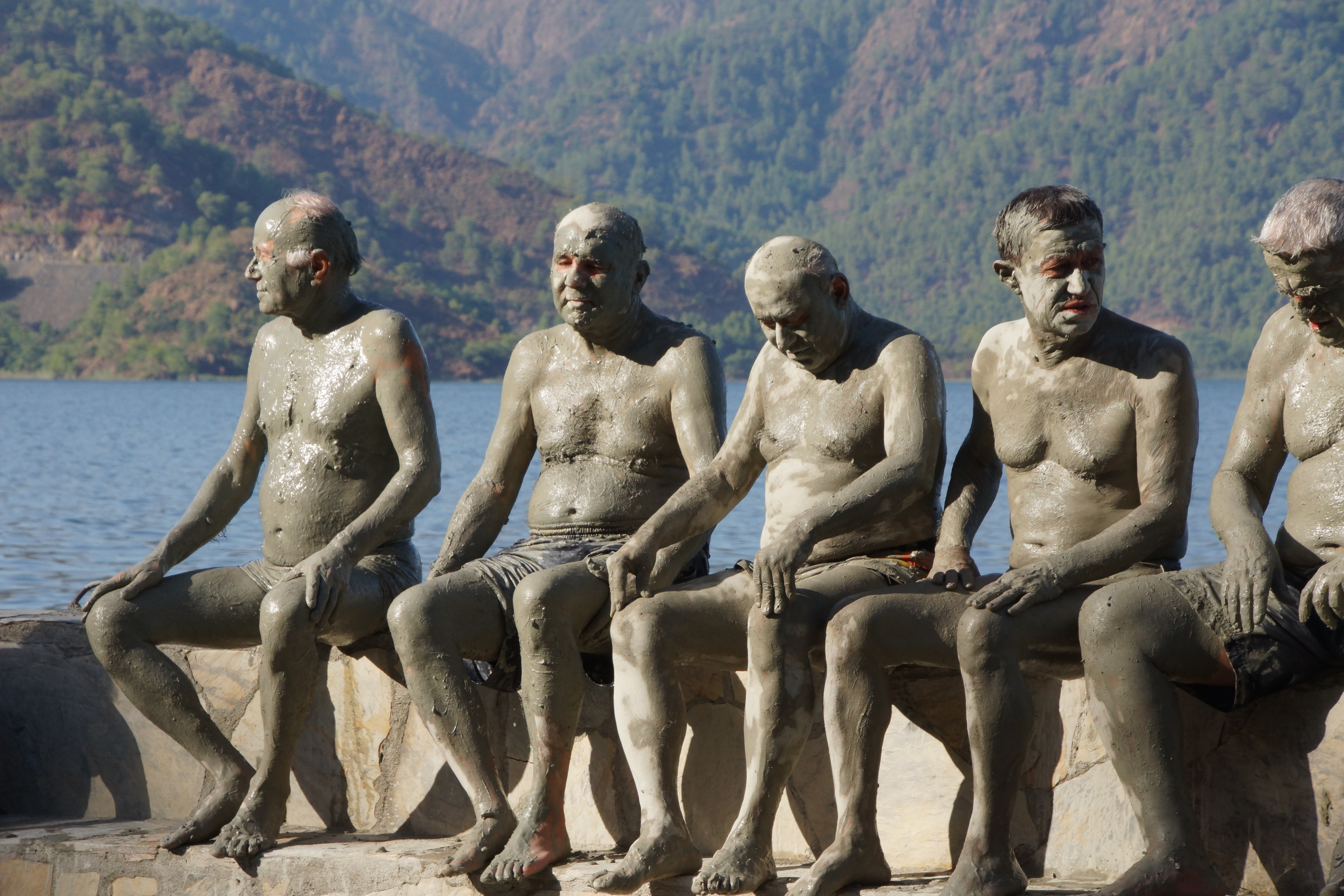 modderbad om mooi te worden